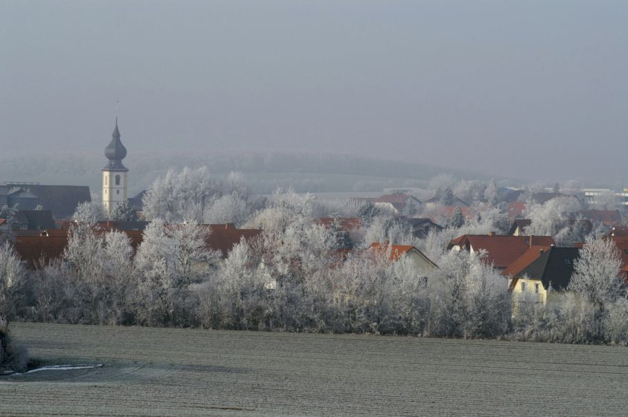 Author: Elisabeth Dauscher Location: 55234 Erbes-Büdesheim, Rhineland-Palatinate